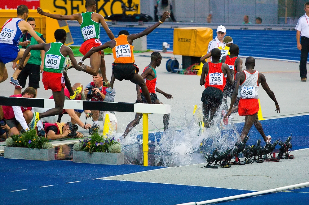 3000m Hindernislauf...der Wassergraben